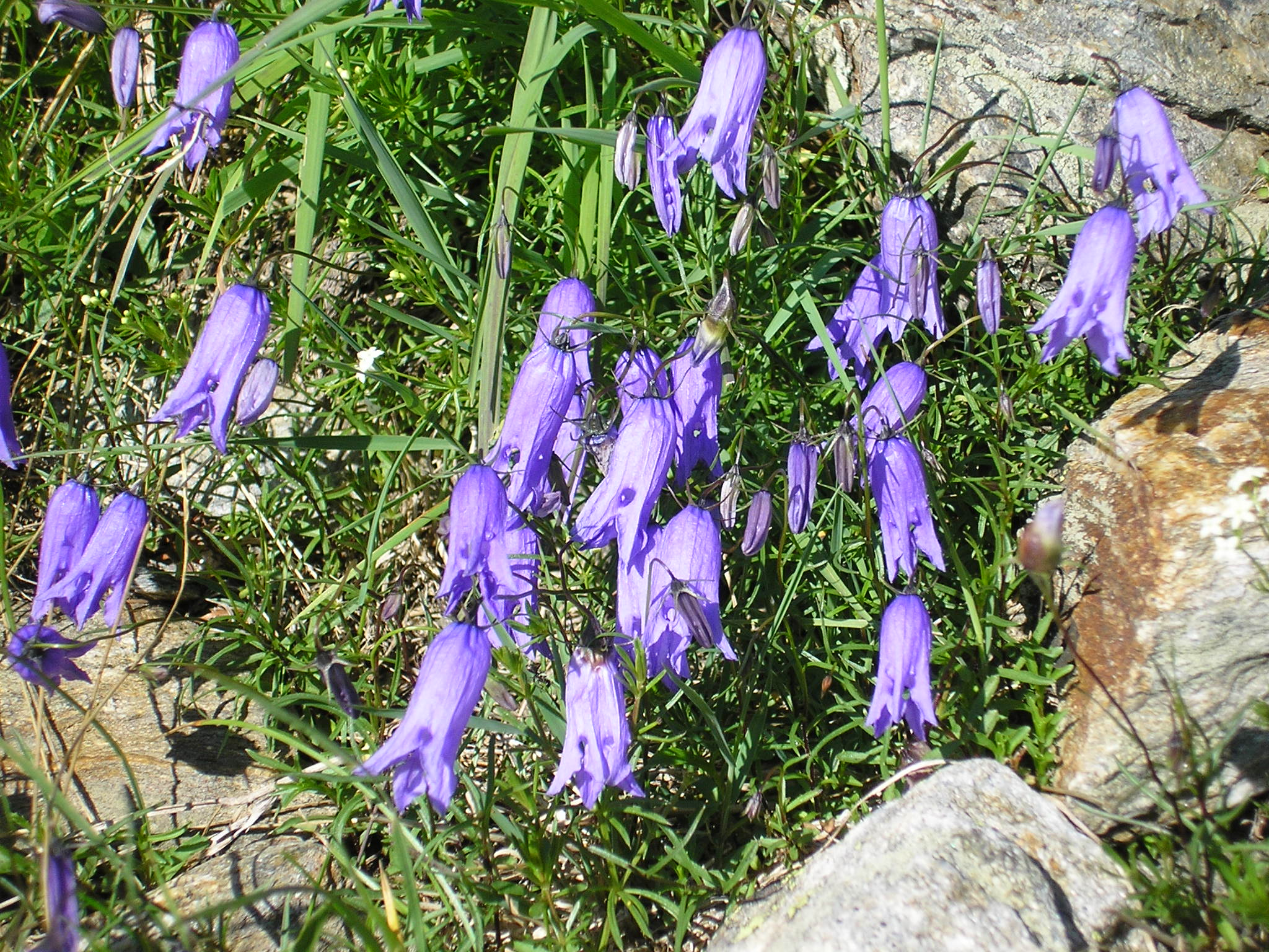 Campanula excisa, Swiss Alps, Saastal